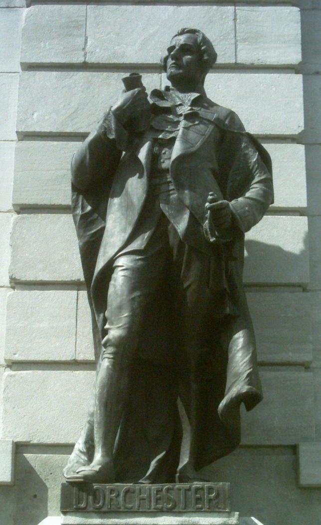 Guy Carleton, Lord Dorchester (1724-1808), statue de la façade de l'hôtel du Parlement, Québec